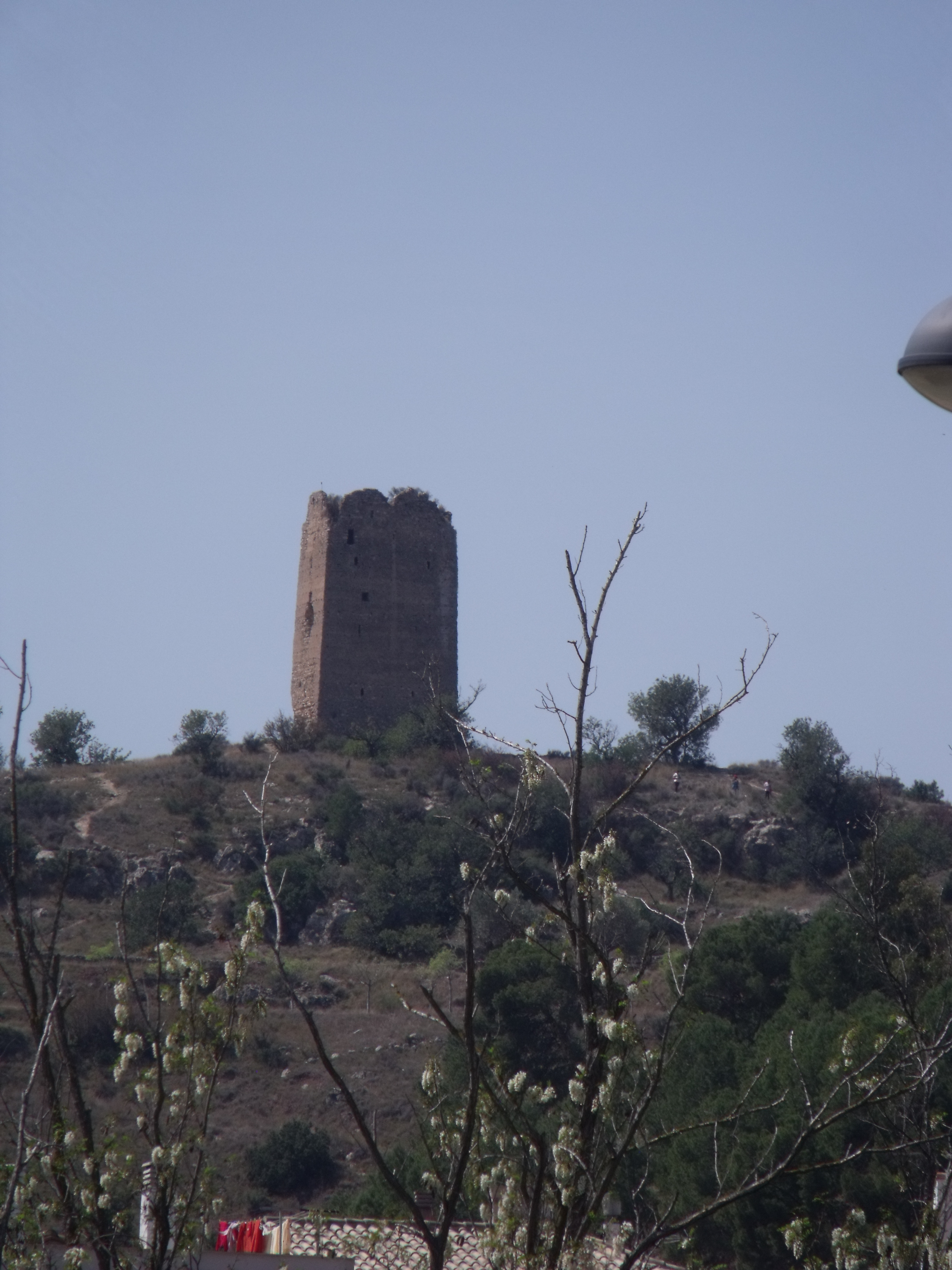 Torre de Montroi